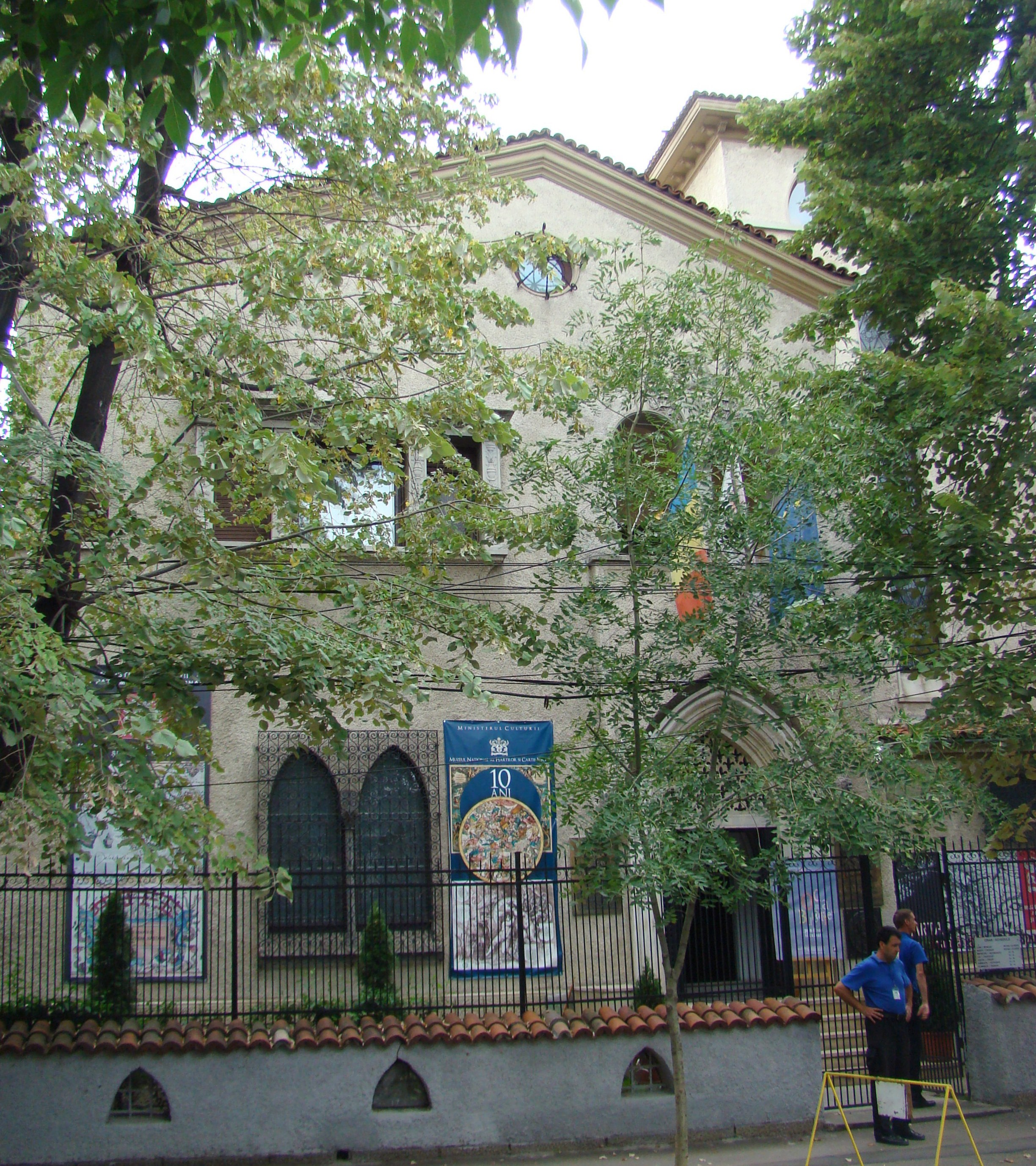 Casă monument istoric, str.Londra, nr.39 (în prezent Muzeul Național al Hărților și Cărții Vechi)